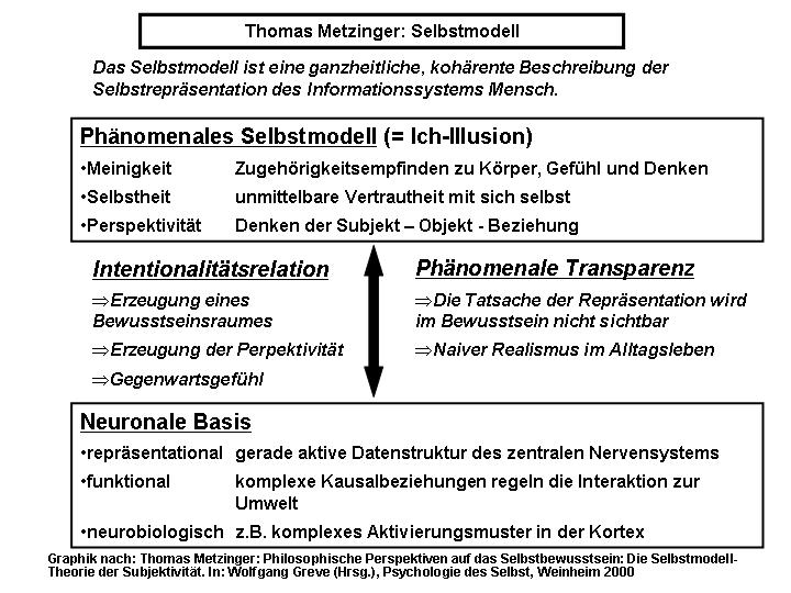 Übersicht über die Theorie des Selbstmodells von Thomas Metzinger